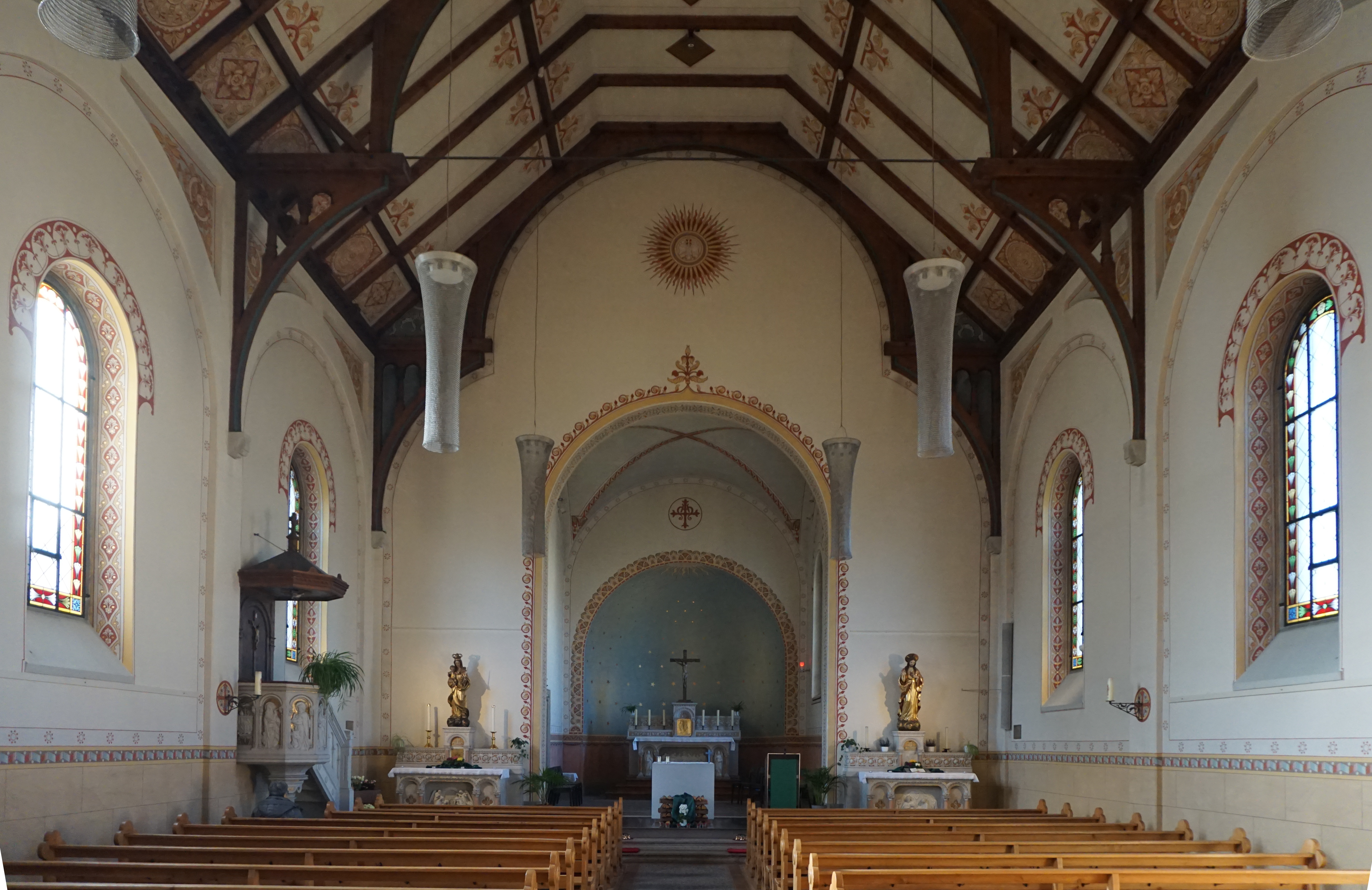 Kirche Maria Himmelfahrt Burgdorf, Innenübersicht